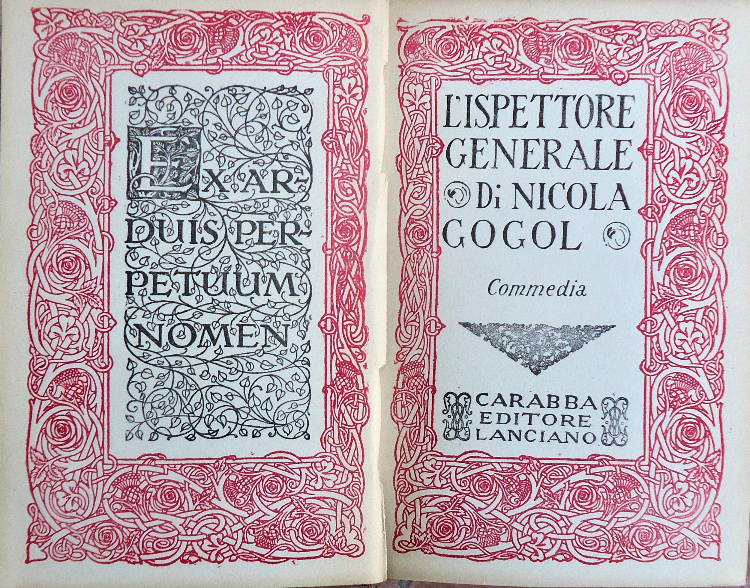 Collana Scrittori italiani e stranieri. Commedia in 5 atti. Introduzione di F. Verdinois. (Coll. F. Samaritani-Gogol)